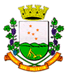 Brasão do municipio de São Valentim